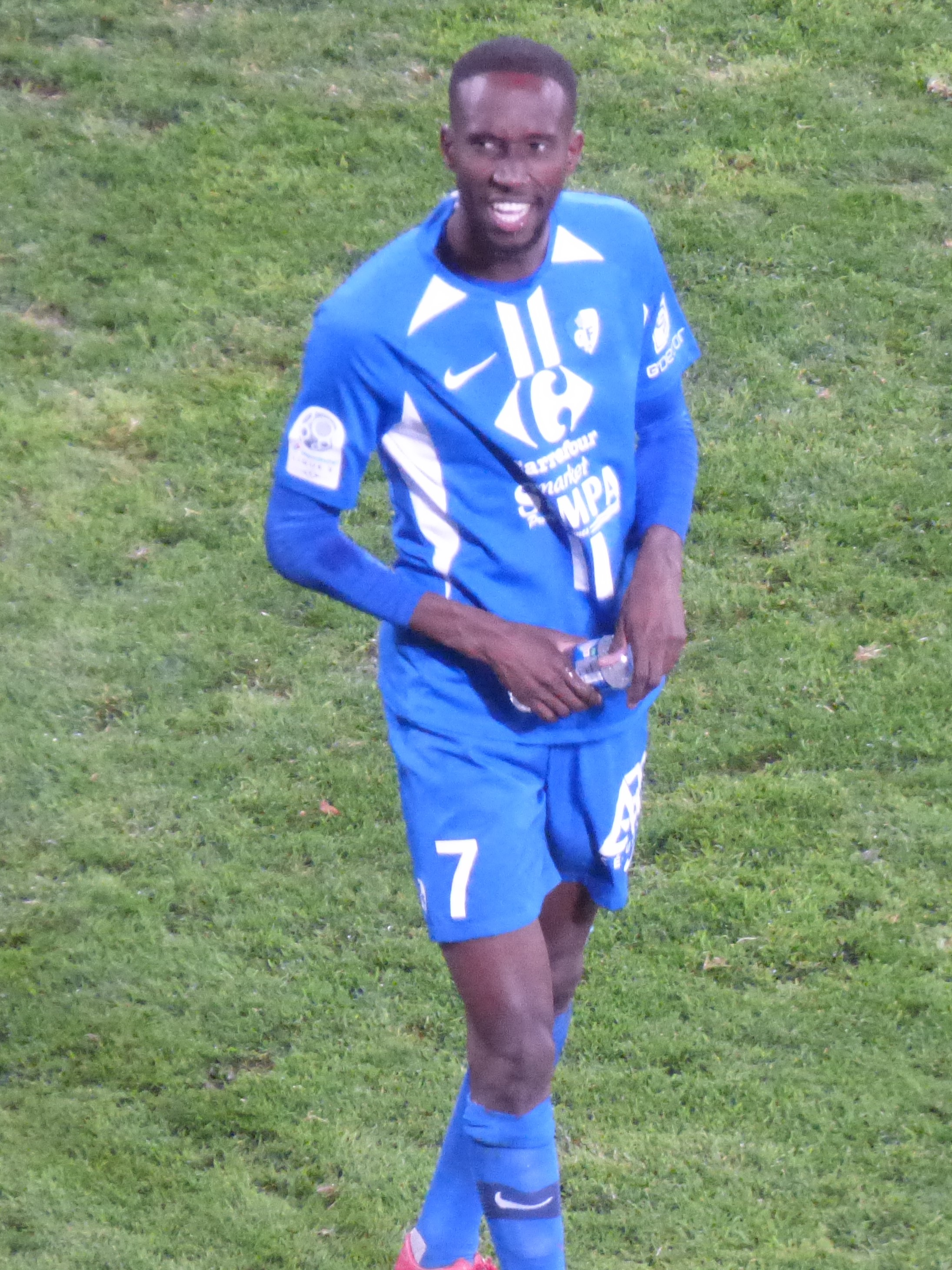 Willy Semedo lors du match RC Lens / Grenoble Foot 38, le 10 février 2020, comptant pour la vingt-quatrième journée du championnat de France de football de Ligue 2 2019-2020, au Stade Bollaert-Delelis.